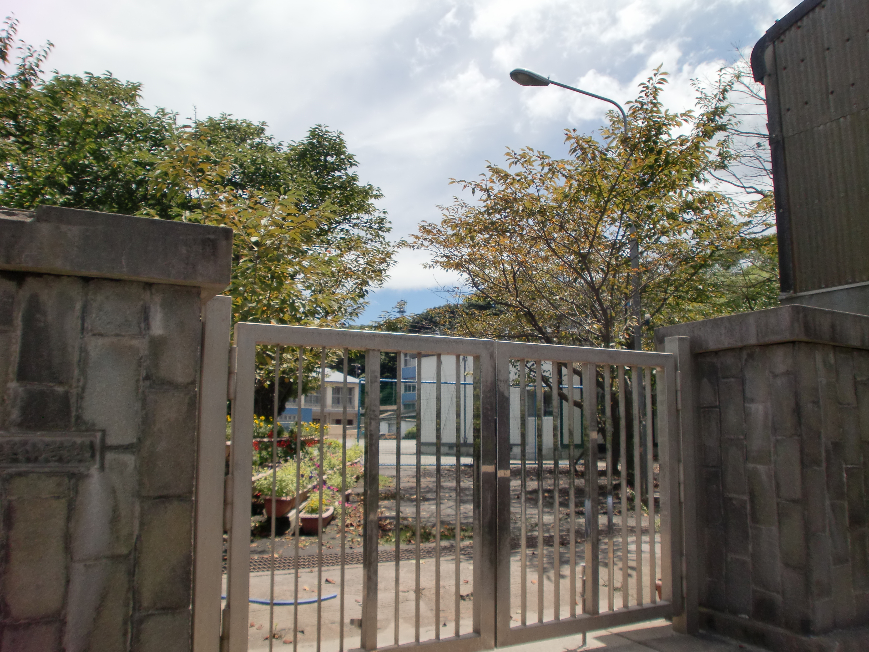 鹿児島市立桜峰小学校を正門から撮影。